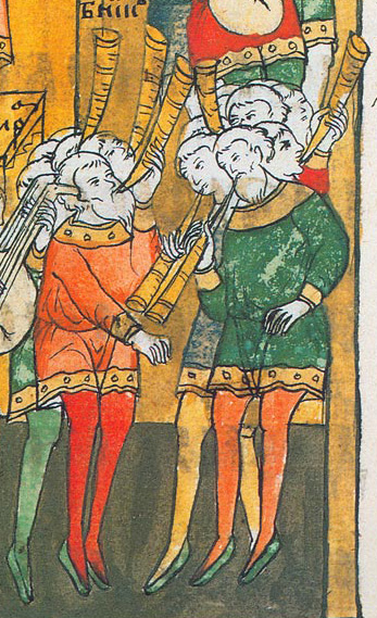 Давид-псалмопевец (фрагмент). Годуновская псалтирь. 1594